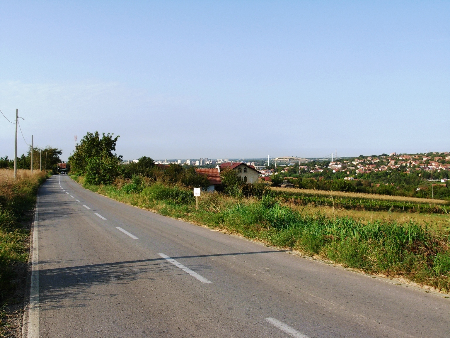 Fruškogorski put. U pozadini se vide Most slobode, Petrovaradinska tvrđava, Novi Sad i Sremska Kamenica.